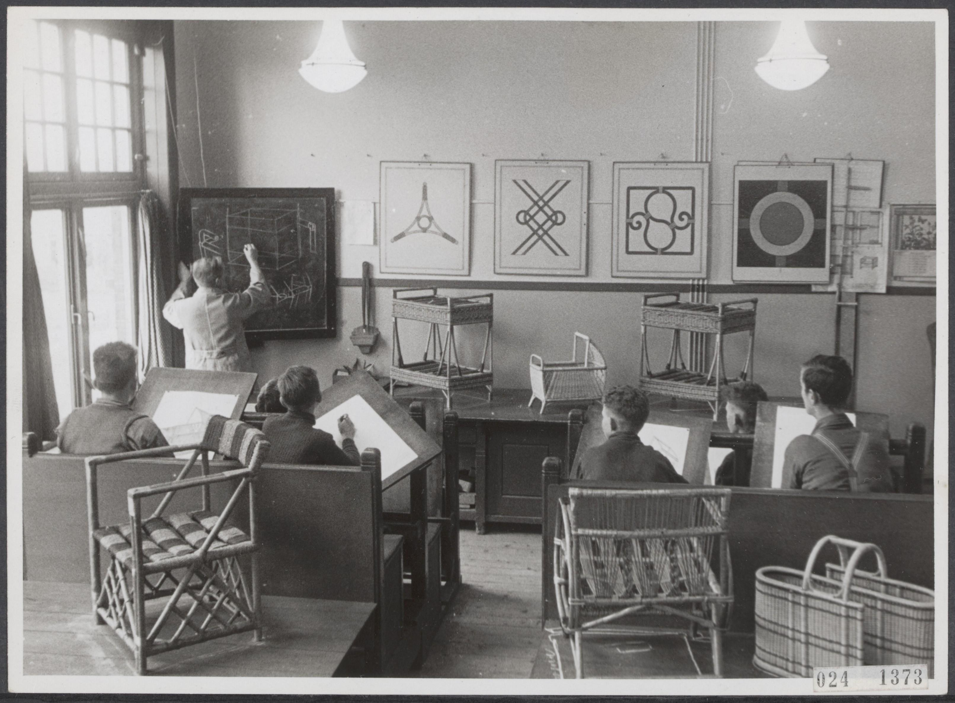 Rijksrietvlechtschool te Noordwolde Beschrijving "Tekenles" Datum maart 1942 Locatie Friesland, Noordwolde Trefwoorden ambachten, onderwijs, riet, scholieren, tekenen, tweede wereldoorlog Instellingsnaam Rijksrietvlechtschool